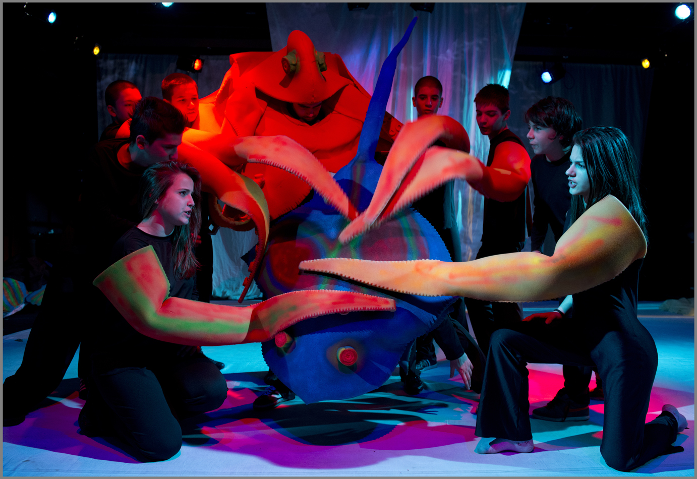 сцена от "Морскосиньо" по Валери Петров